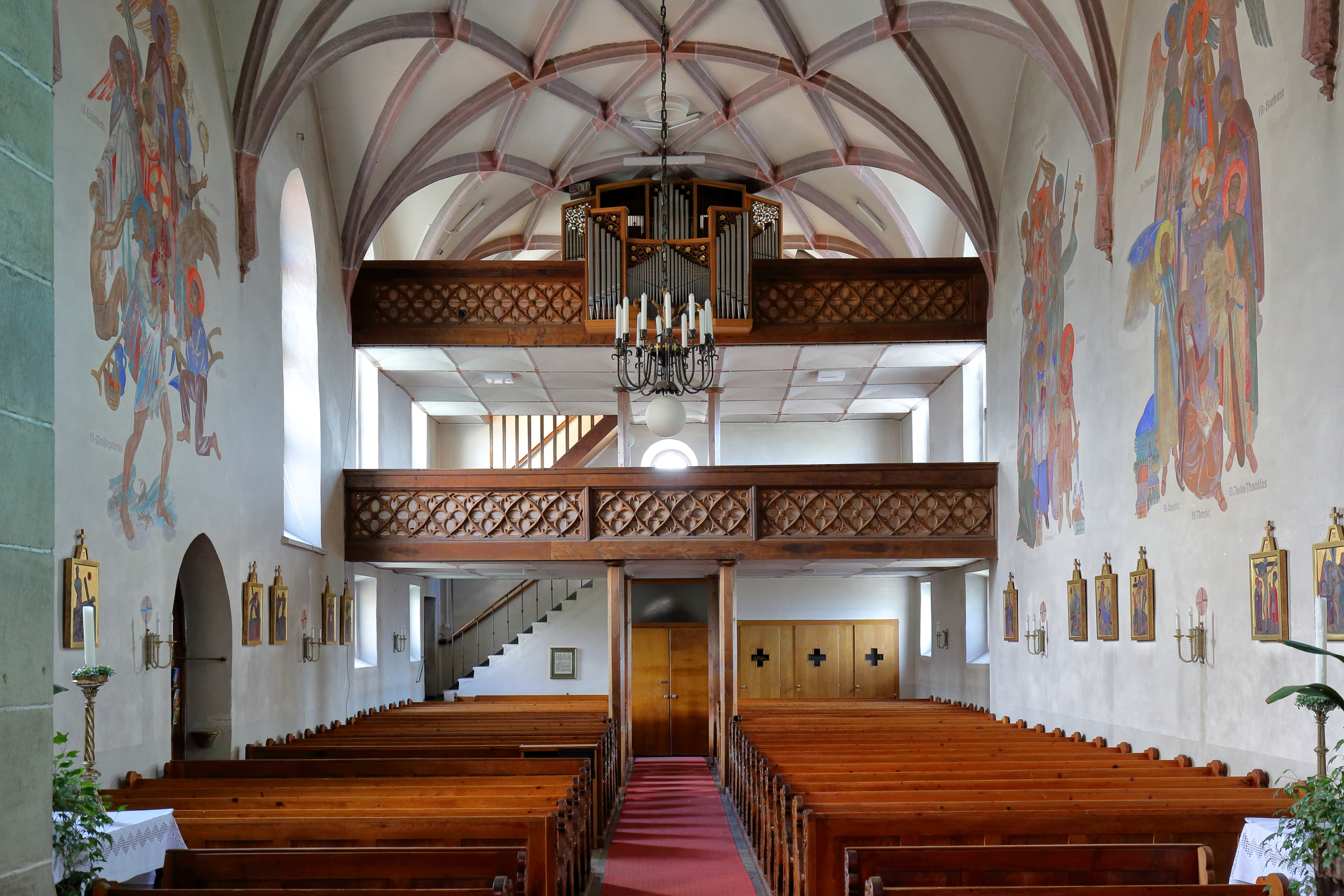 Blick Richtung Orgelempore in der röm.-kath. Pfarrkirche hl. Valentin in der oberösterreichischen Gemeinde Weyregg am Attersee.Die spätgotische Kirche wurde in der zweiten Hälfte des 15. Jahrhunderts errichtet und 1931/1933 umgebaut sowie erweitert. Die Seccomalereien an den Wänden sind Werke von Karl Weiser aus den Jahren 1951/52. Die 1963 geweihte Orgel wurde von Hubert Neumann aus Götzis begonnen und von Wilhelm Zika (Oberösterreichische Orgelbauanstalt) fertiggestellt.